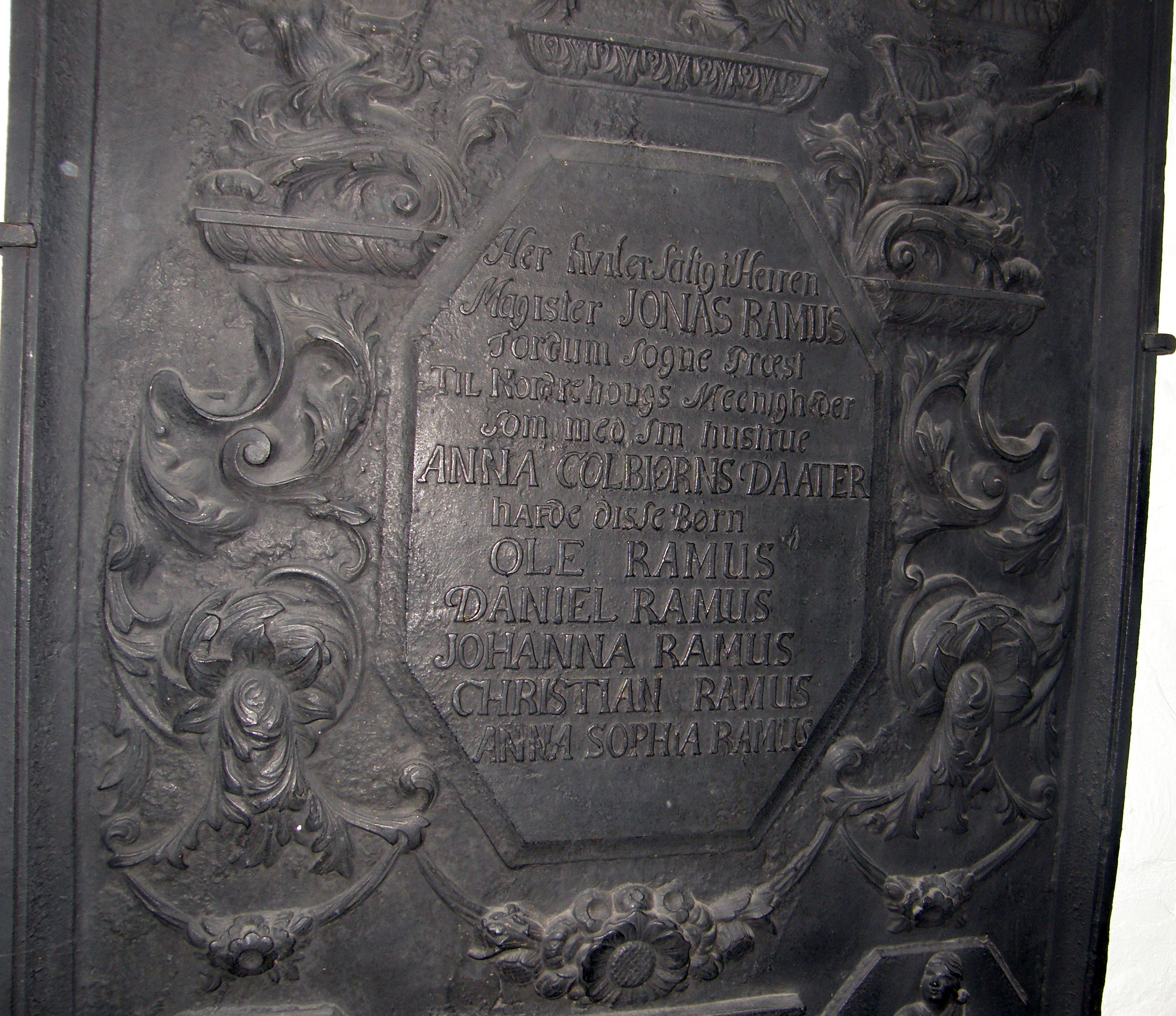 Norderhov kirke, gravplate over Ramus-slekten